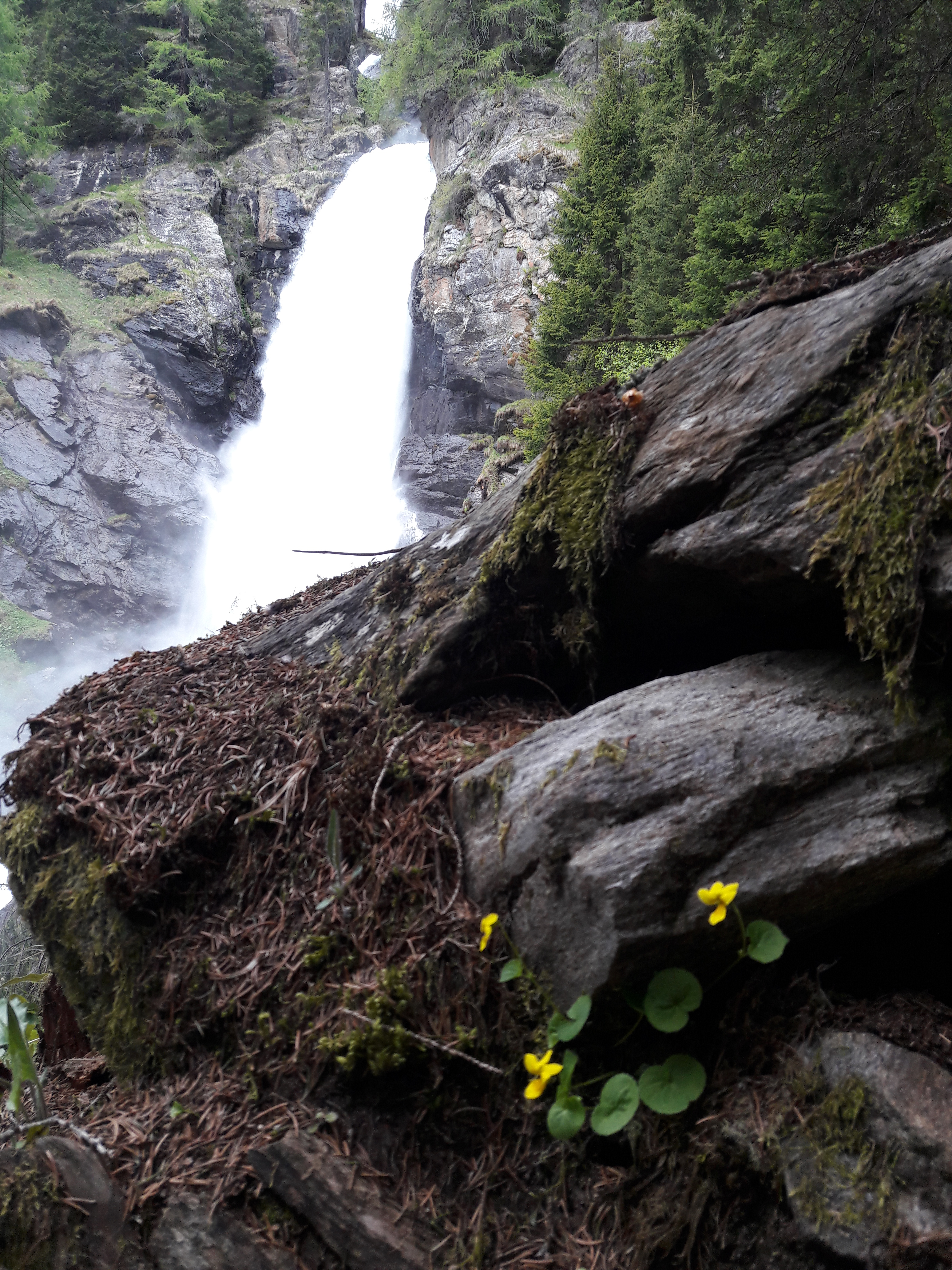 Alta Val di Rabbi (Q47499289)